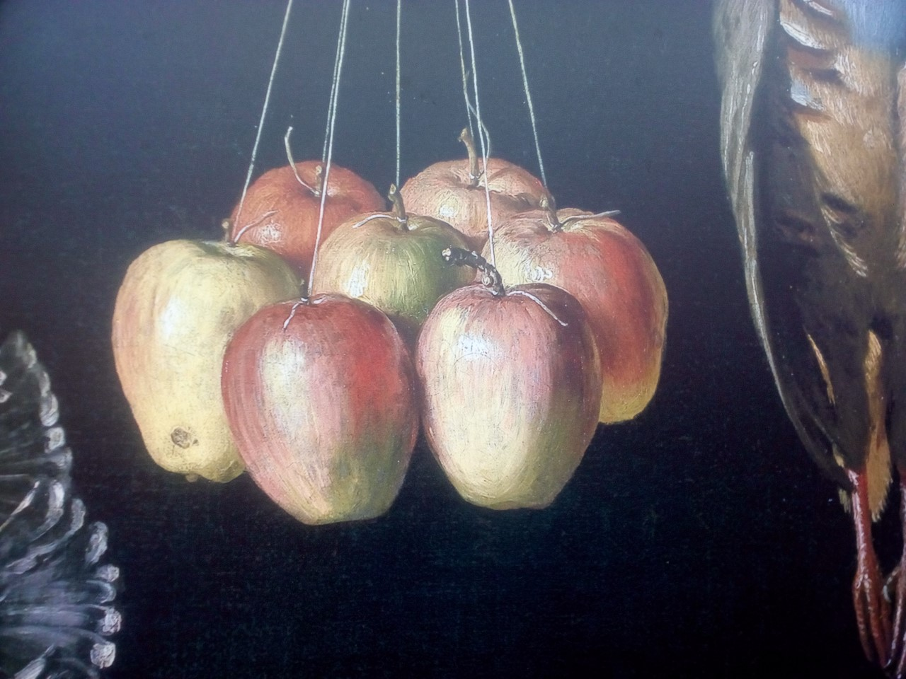 Pendantaj pomoj